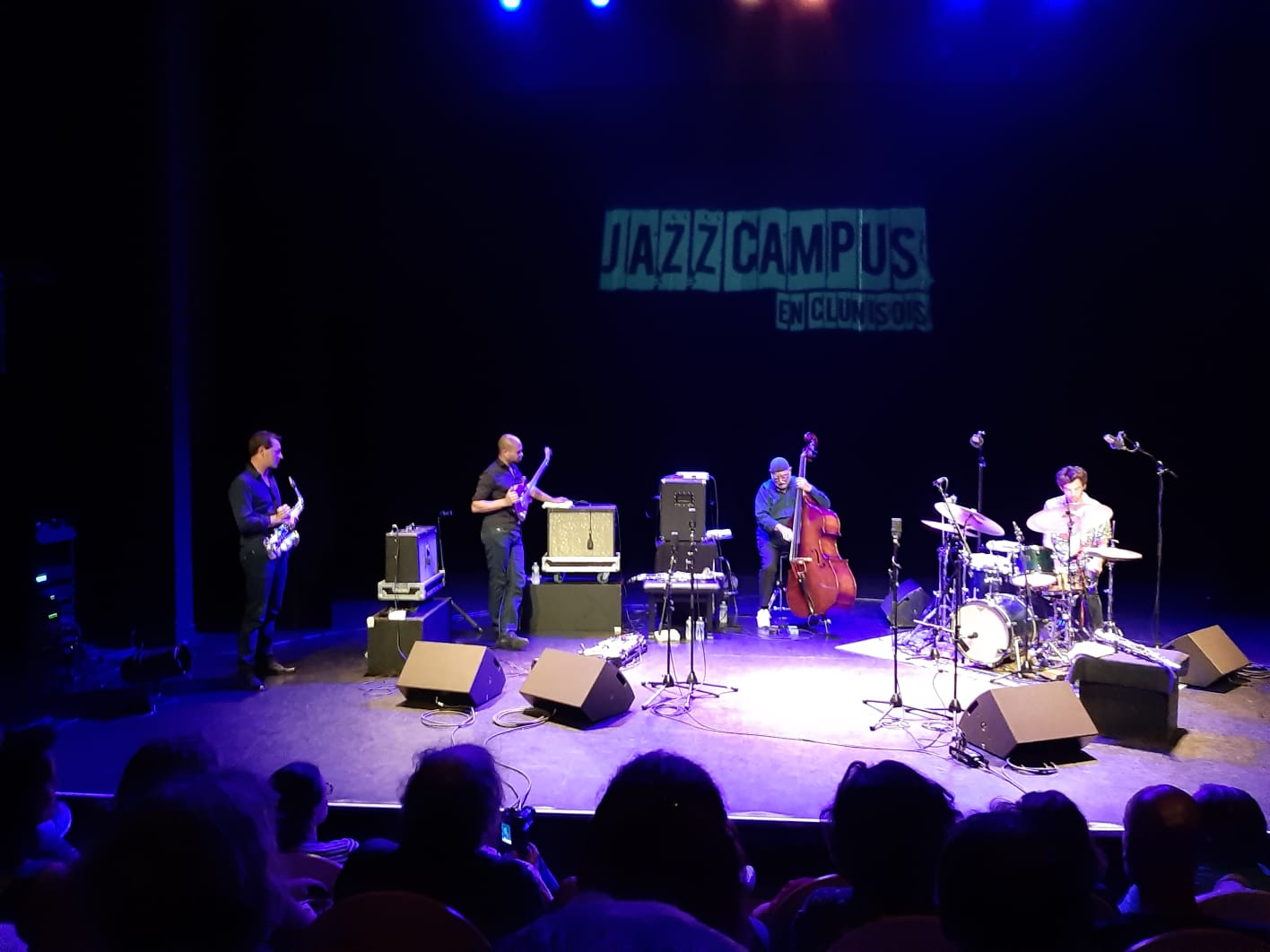 Henri Texier Sand Quintet (mit Vincent Lê Quang, Sébastien Texier, Manu Codjia, Gautier Garrigue) bei einem Konzert im Theatre des arts in Cluny